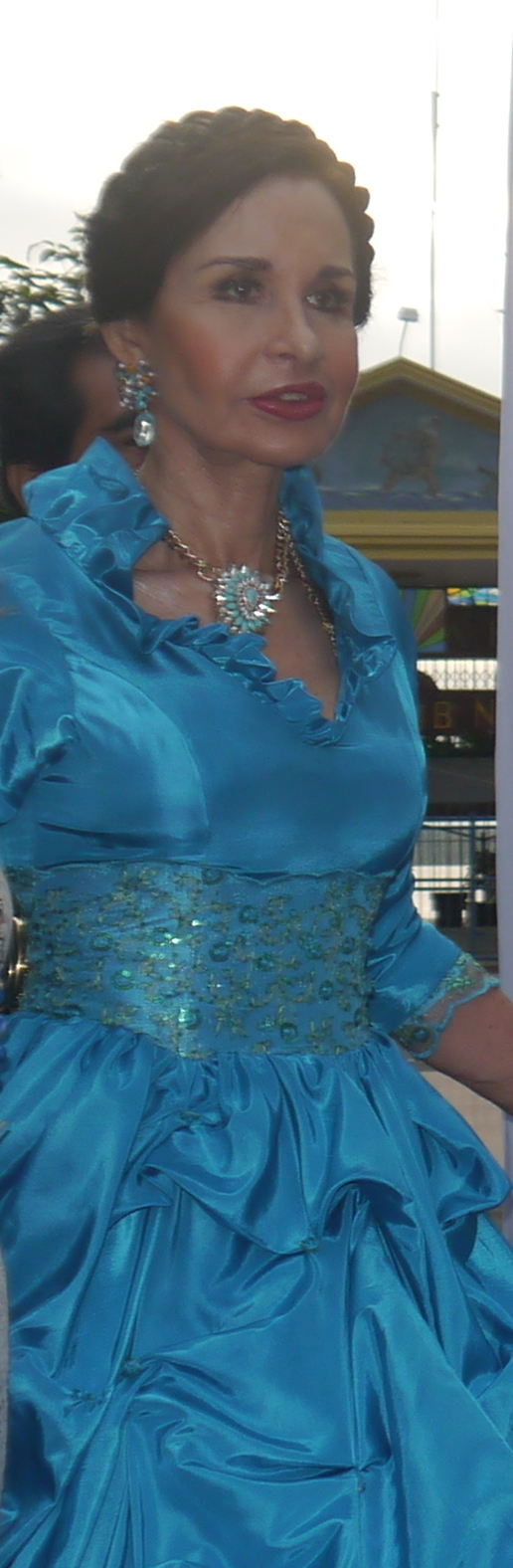 Participantes y organizadores del Saludo a la Aurora Gloriosa 2015